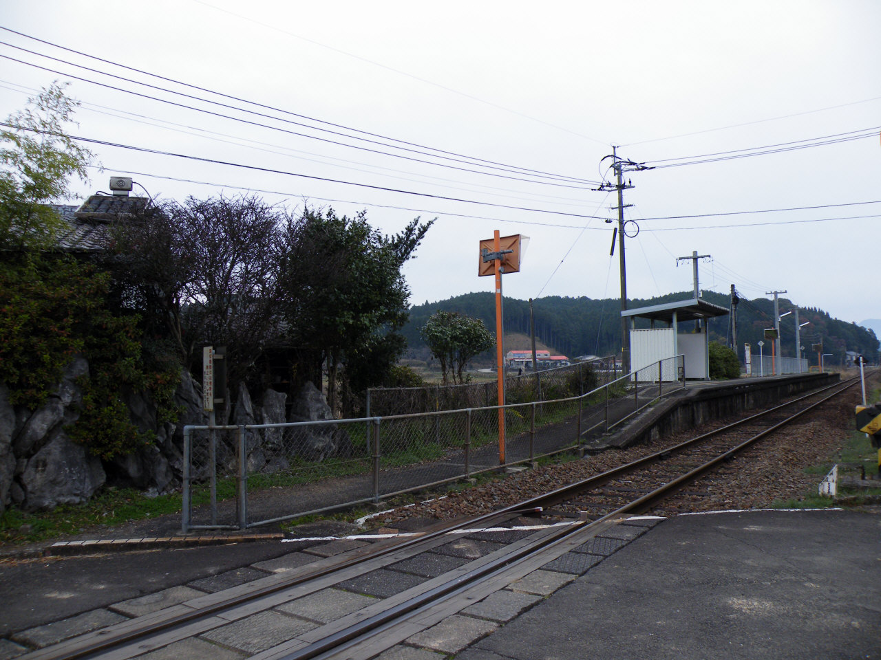 JR九州筑肥線金石原駅全景